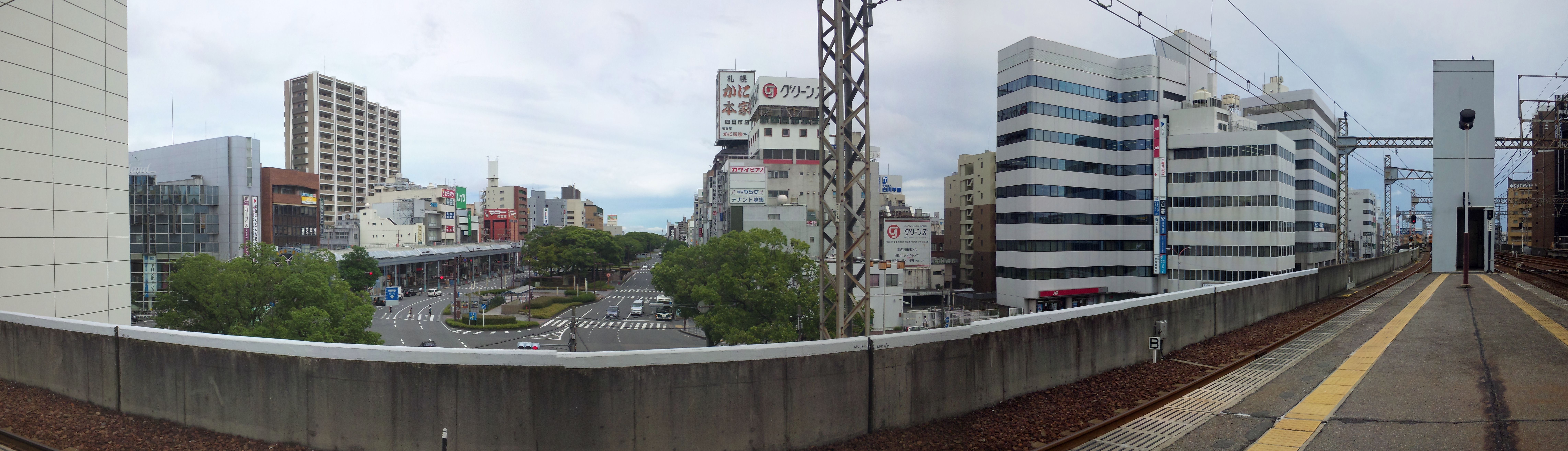 近鉄四日市駅東口方面中央大通（幅70m道路）